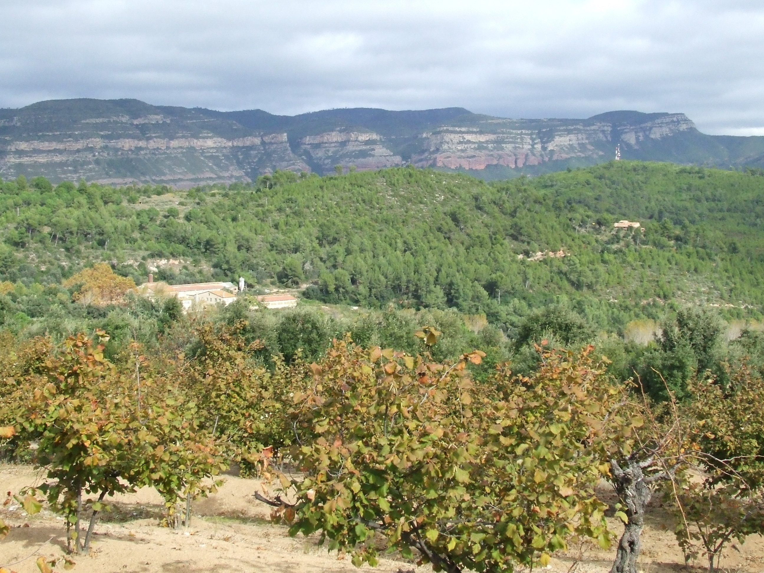 El Serrat de les Fargues i el Turó de Can Garriga (Riells del Fai, Bigues i Riells, Vallès Oriental)